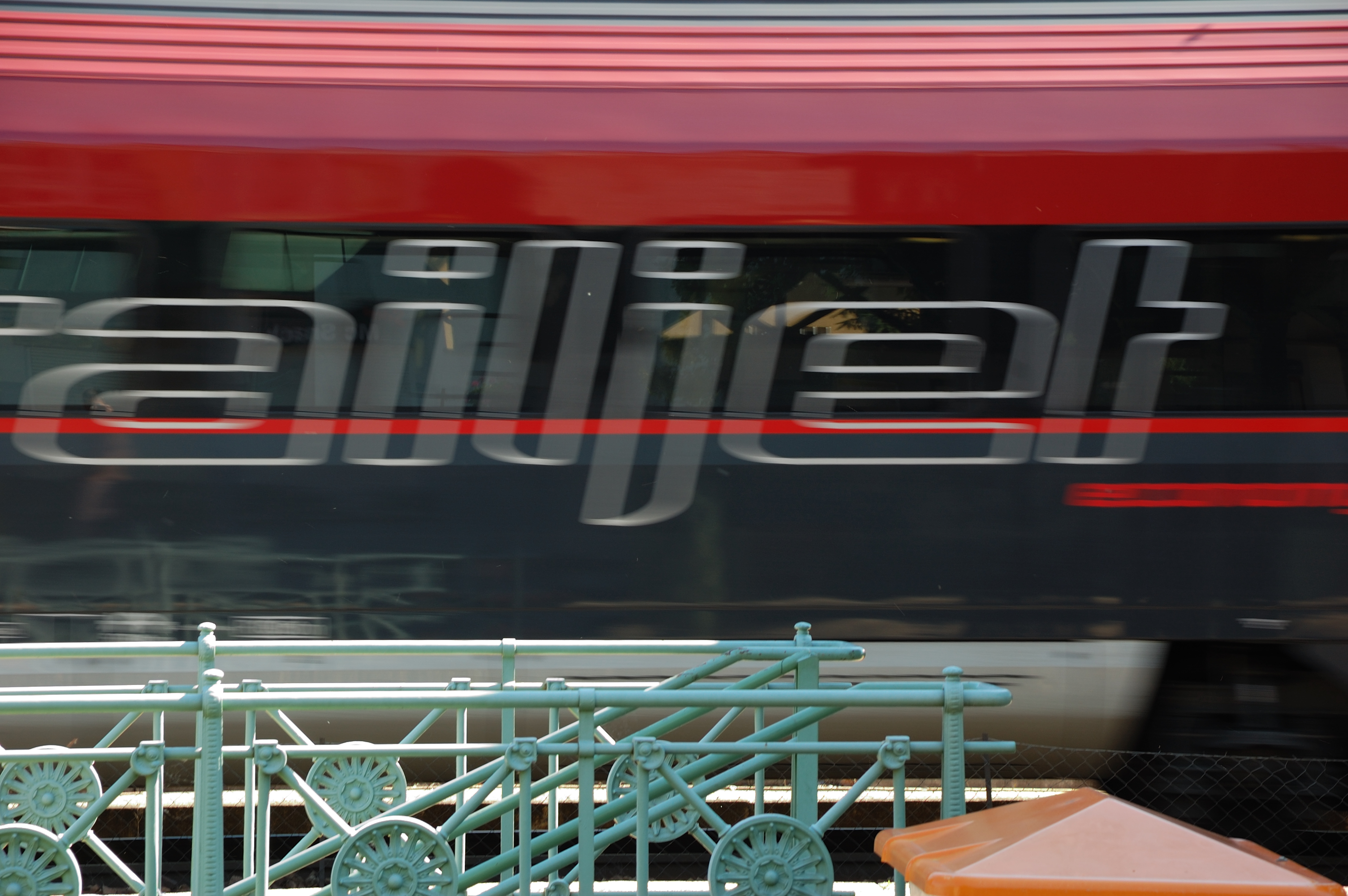 ÖBB Railjet